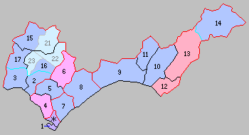 北海道室蘭支庁の町村。